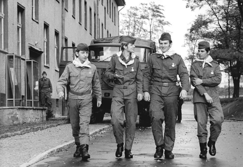 Verabschiedung von NVA-Soldaten ADN-ZB Kaufhold 29.10.80 DDR: In allen Truppenteilen der NVA werden gegenwärtig Soldaten verabschiedet, die nach Ableistung ihres Wehrdienstes in die Betriebe zurückkehren. Künftige Reservisten des Truppenteils "Arthur Ladwig" nach der feierlichen Verabschiedung in ihrer Kompanie.